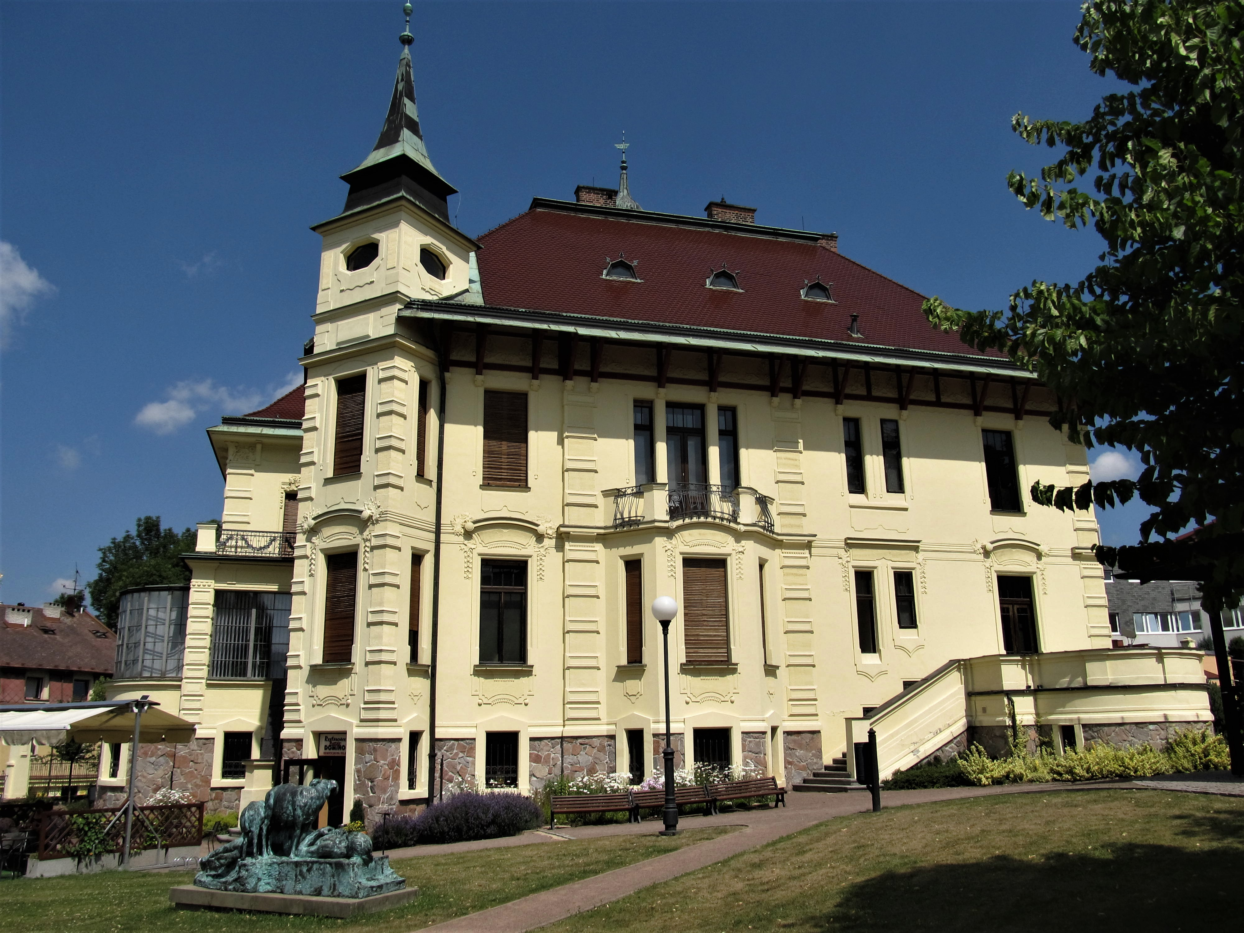 Hernychova vila v Ústí nad Orlicí, pohled ze zahrady